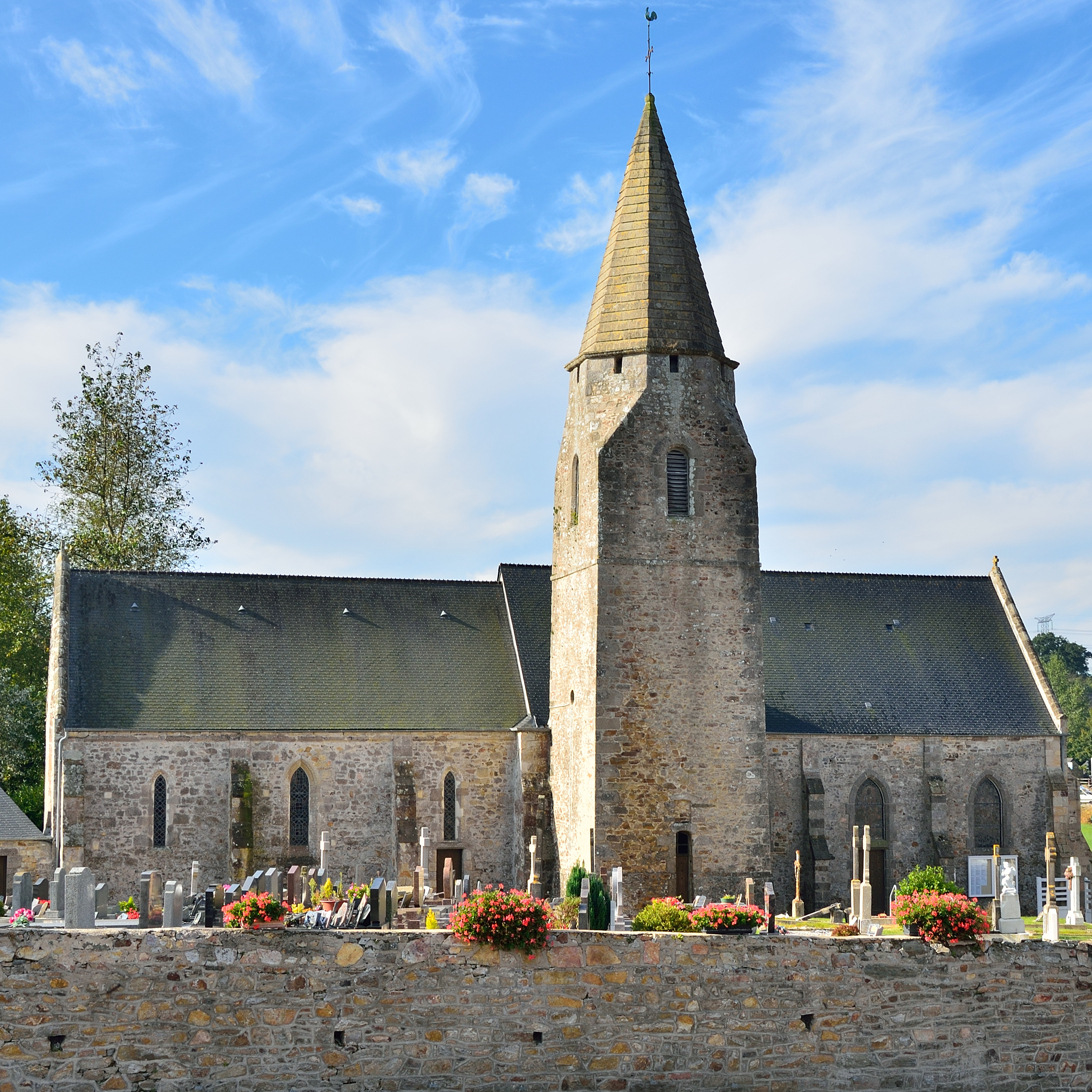 Eglise de Benoîtville, Manche, Basse-Normandie, France .